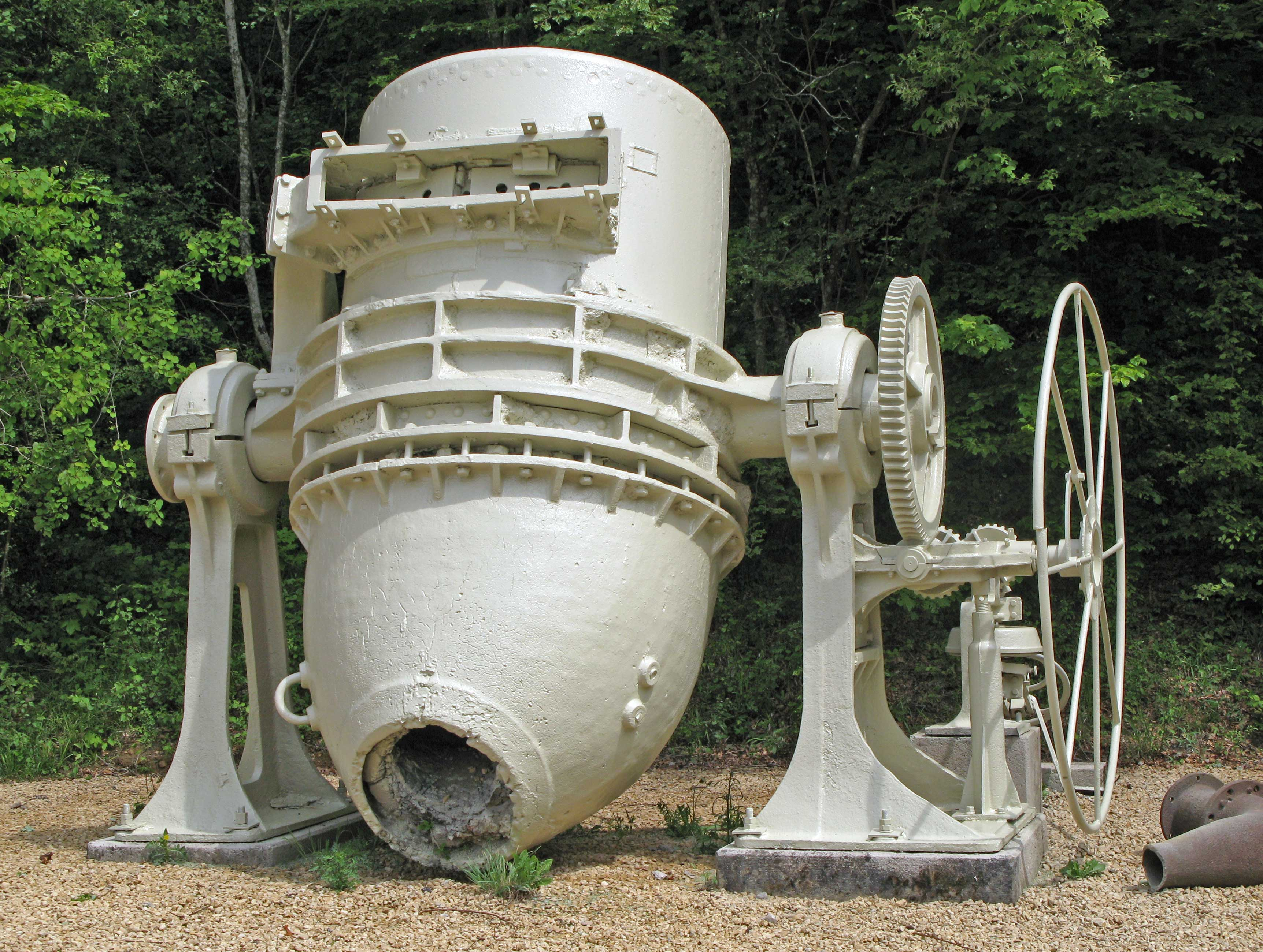 Thomas-Bier in Kategorie:Industrie- an Eisebunnspark Fond-de-Gras.